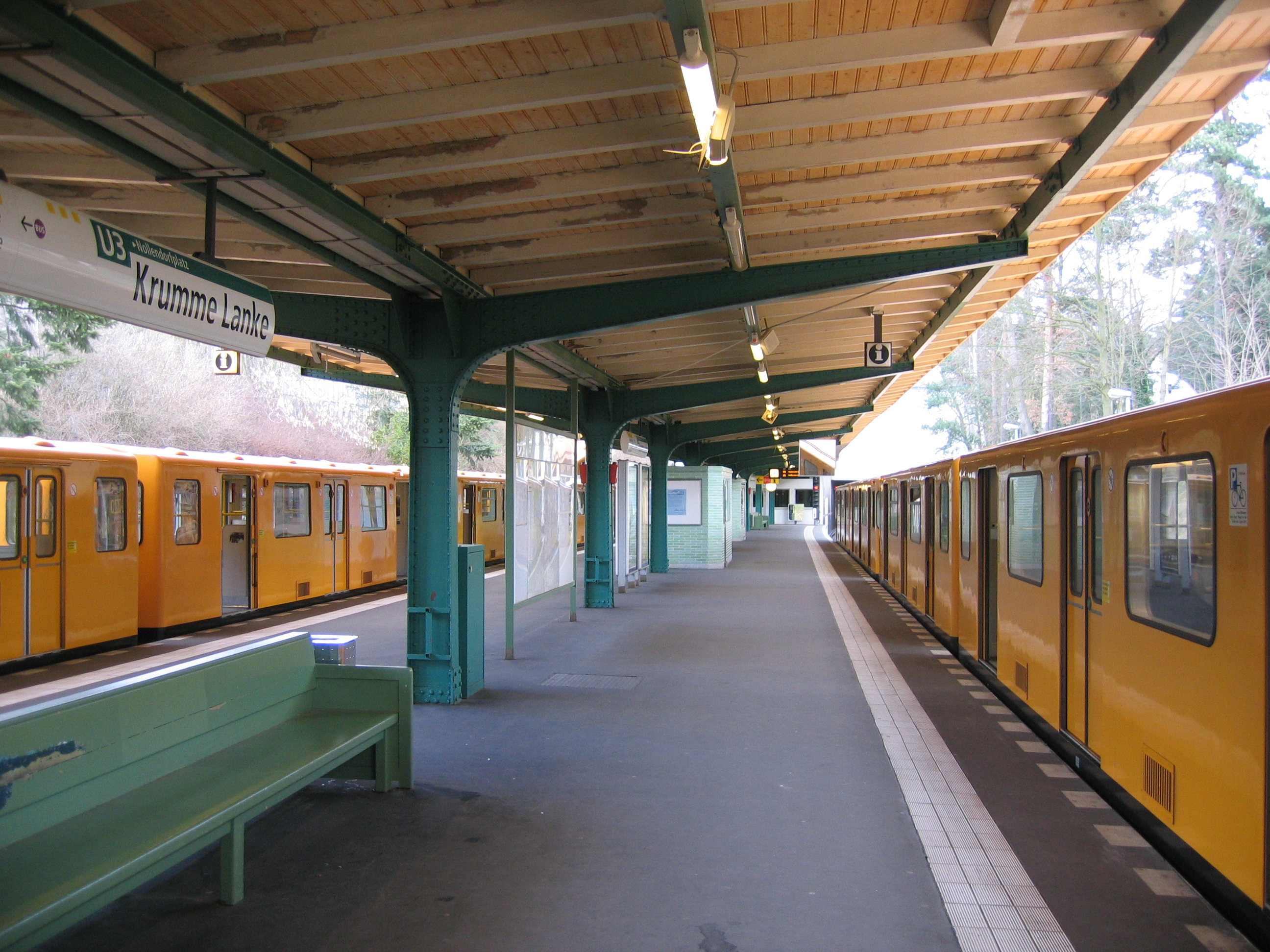 U-Bahnhof Krumme Lanke, Berlin